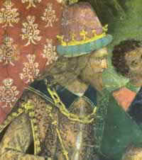 Cèsar Borgia representat com emperador en un detall del Judici de Santa Catalina, de les pintures del apartments Borgia del Vaticà, decorats per Il Pinturicchio.